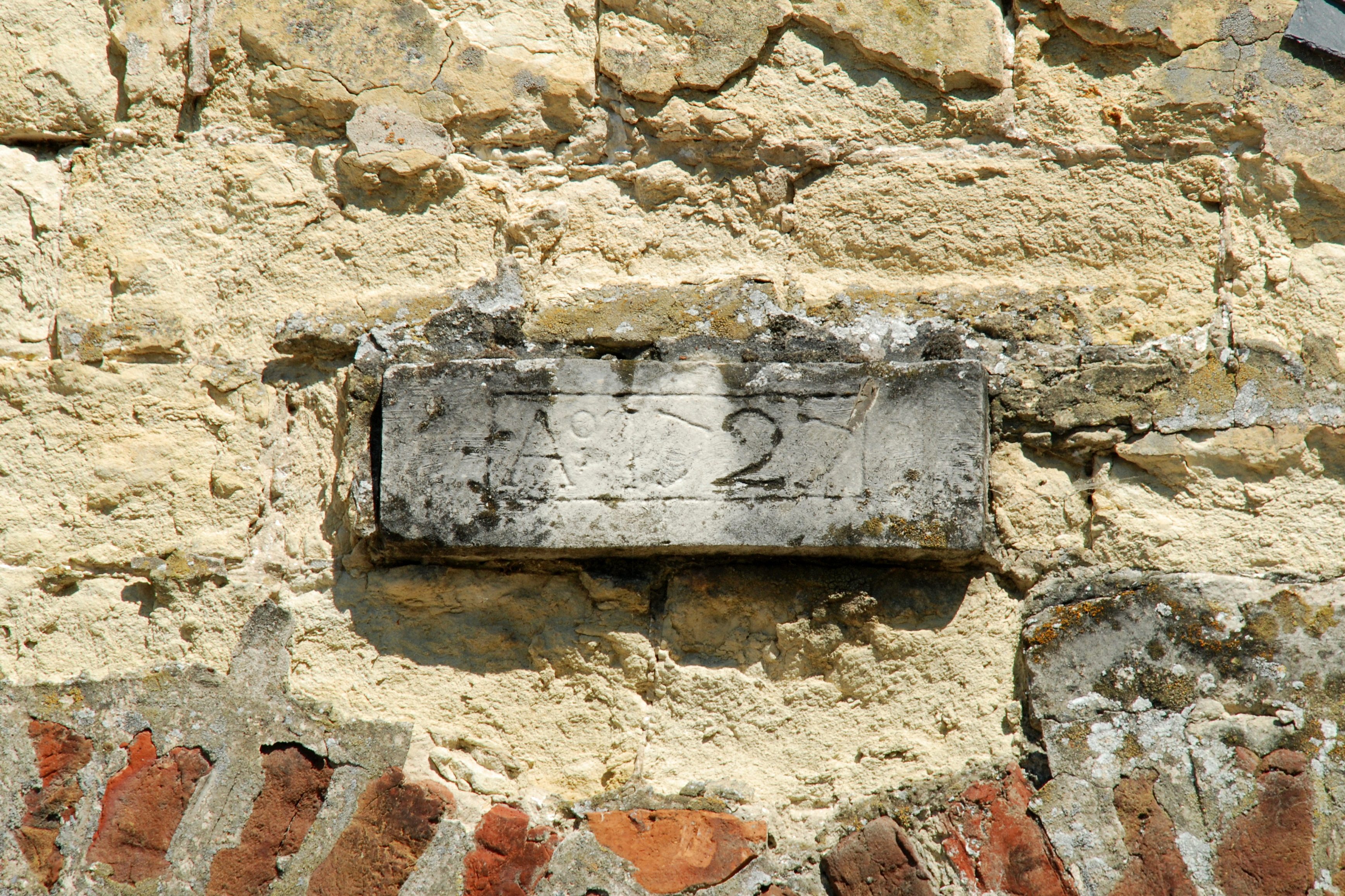 Belgique - Brabant wallon - Hélécine - Neerheylissem - Eglise Saint-Sulpice